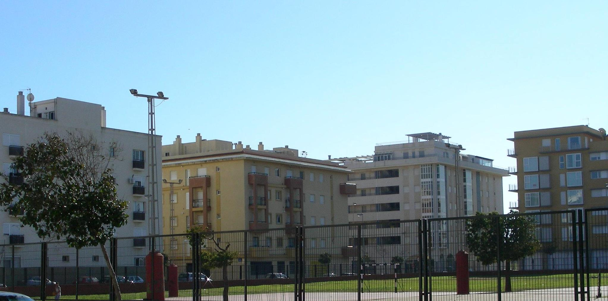 Edificios de la unidad estudio en detalle del plan parcial polideportivo entre av. Parque y Emiliano Cabot.